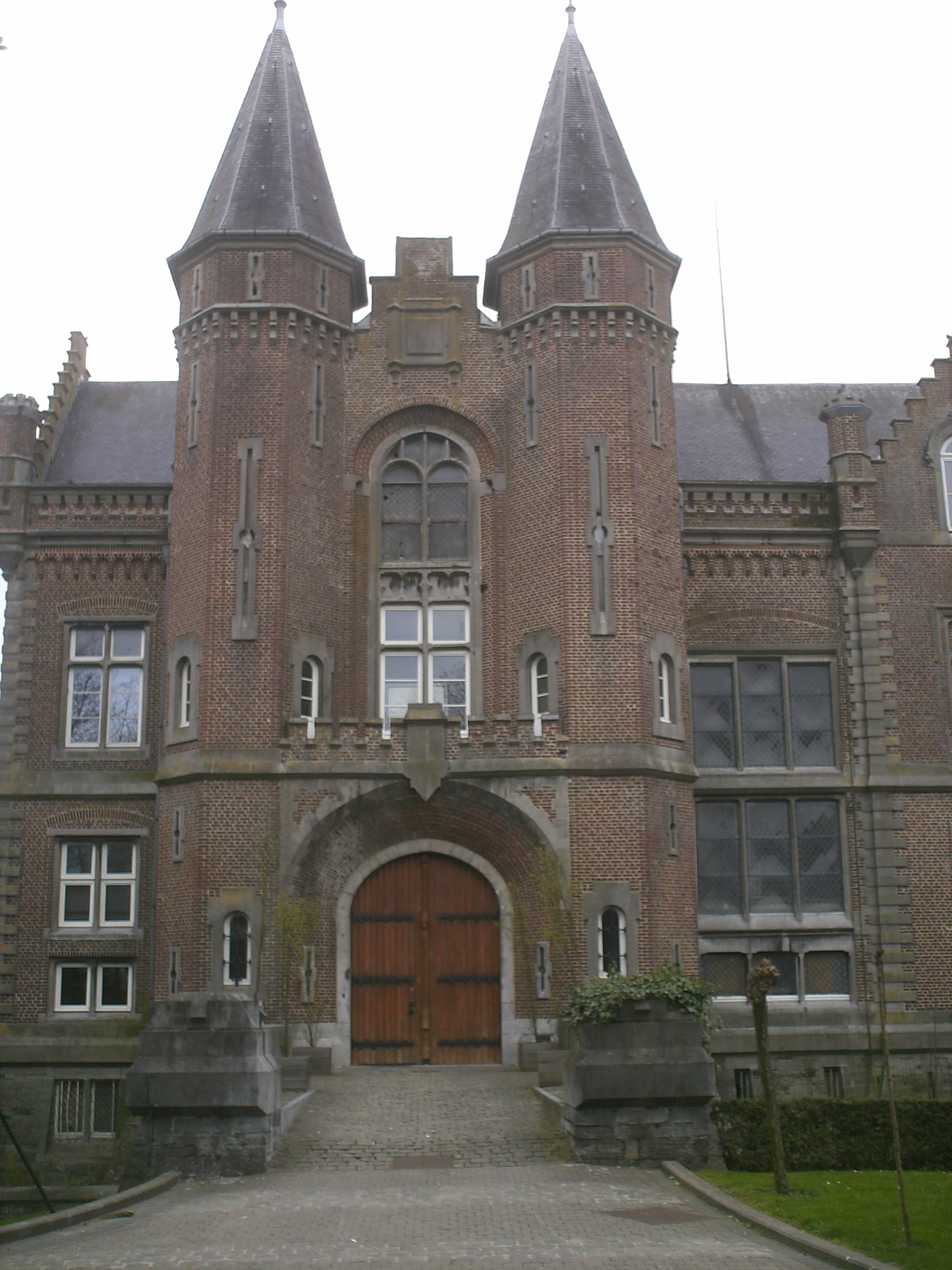 Photographie de l'entrée principale du Château de Bourgogne, à Estambourg